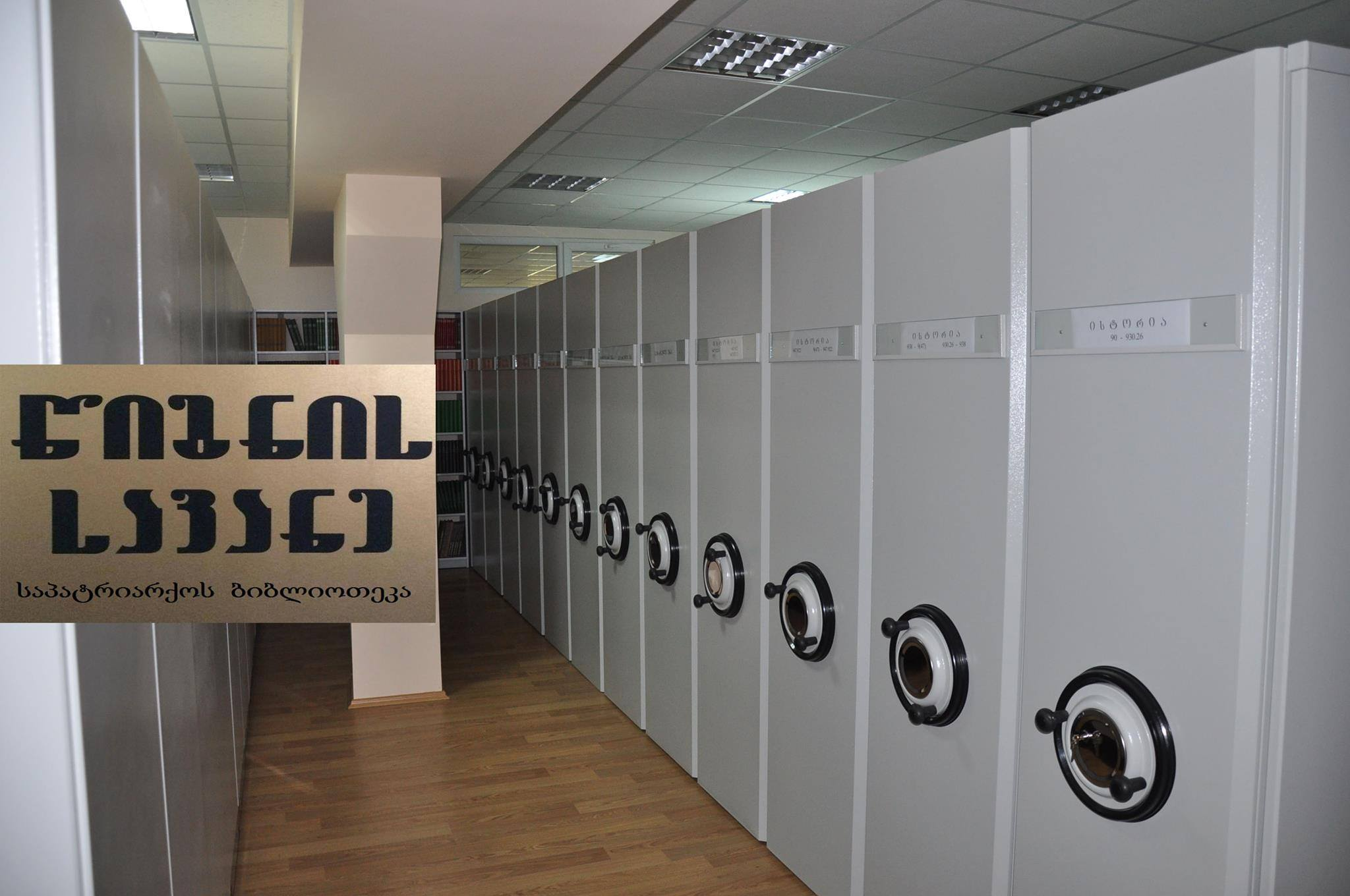 საქართველოს საპატრიარქოს ბიბლიოთეკის წიგნსაცავი